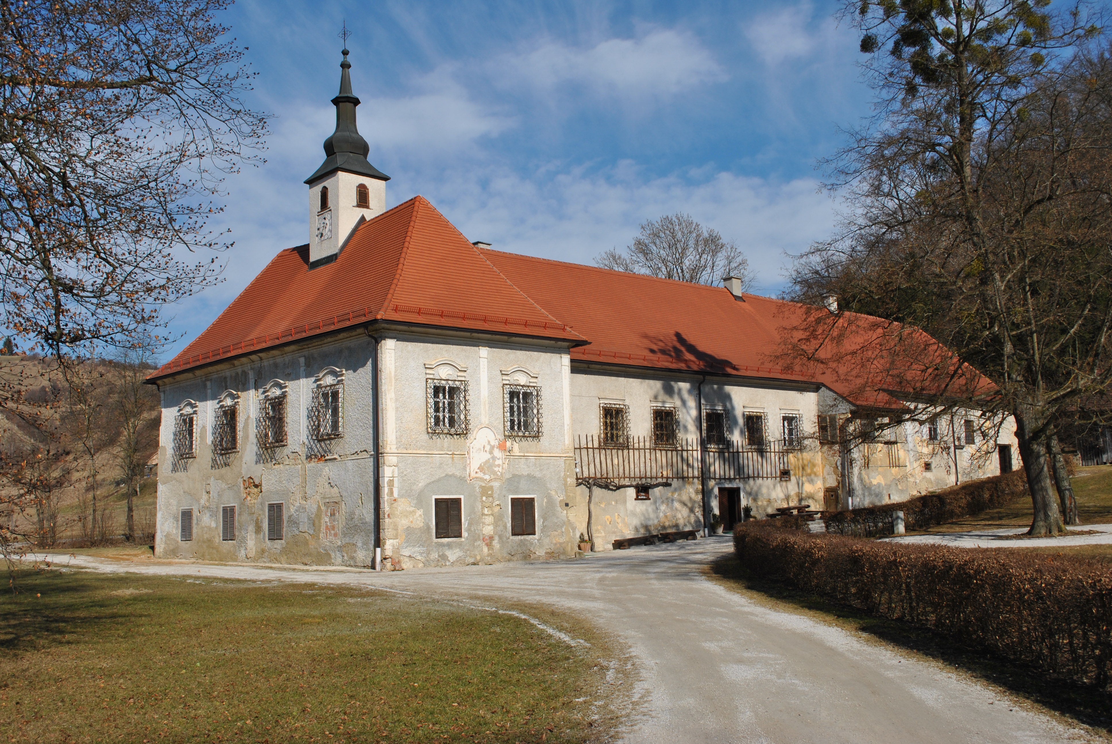 Jareninski dvor